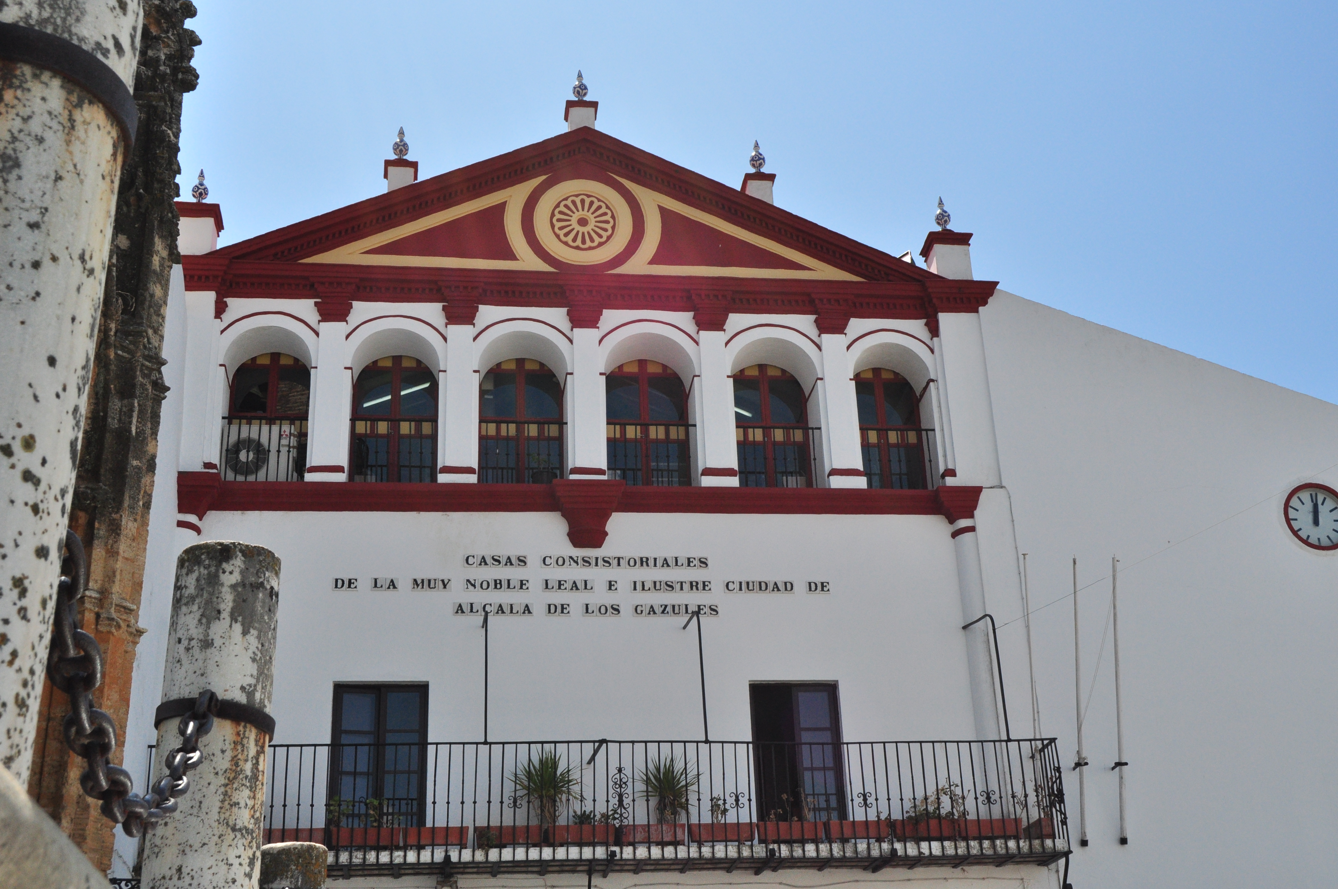 Alcala de los Gazules - 011